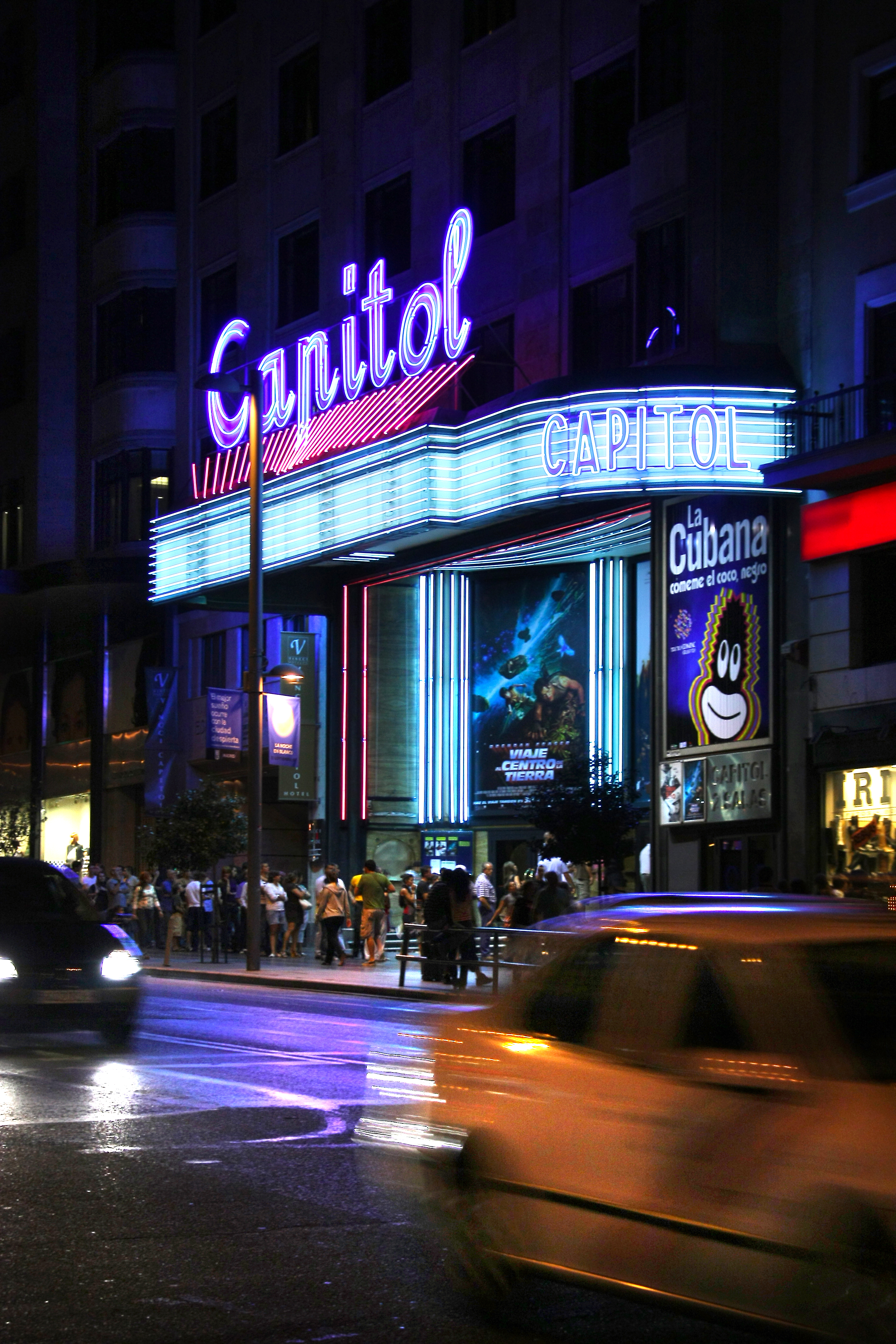 Cine Capitol. Gran Vía, Madrid. España, 2008.